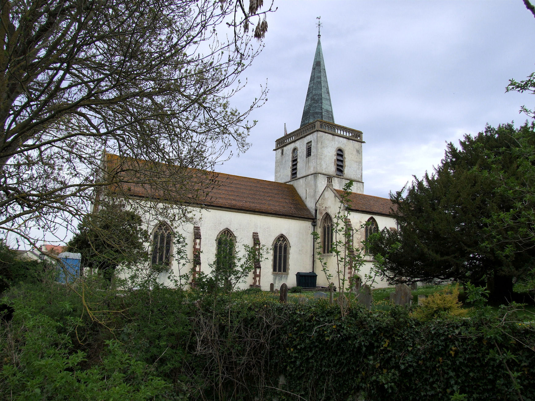 St Andrew's Church, Stogursey, West Somerset